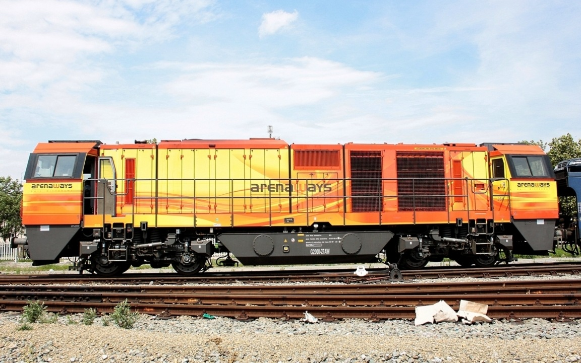 Locomotiva G 2000.27 in attesa di manovrare